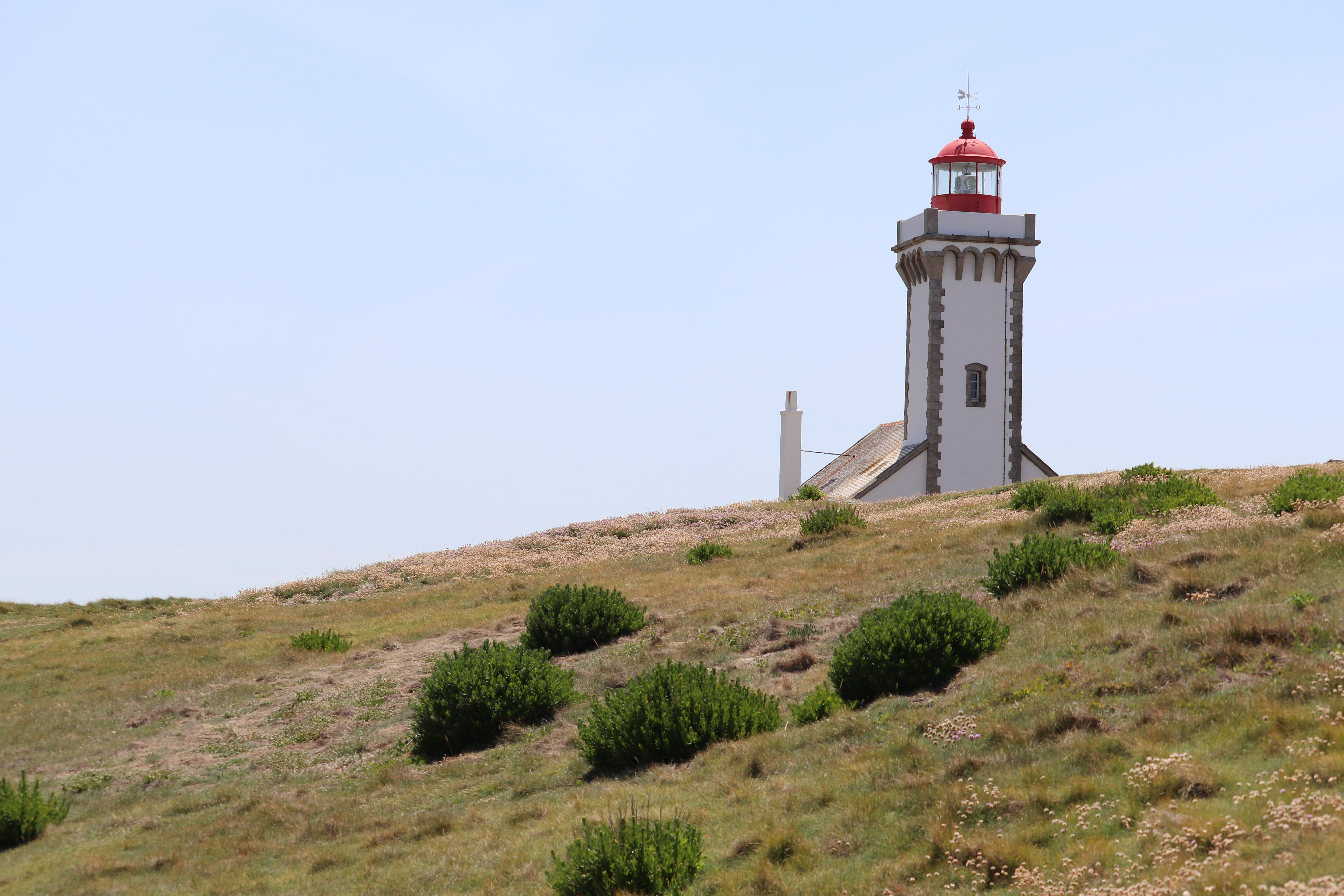 Vue latérale du phare de la Pointe des Poulains, Belle-Île